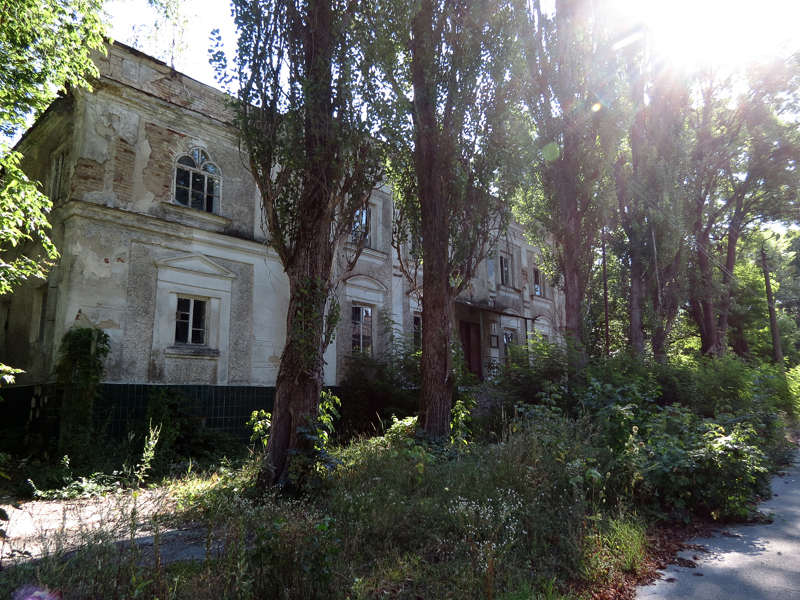 Синагога в Чернобыле